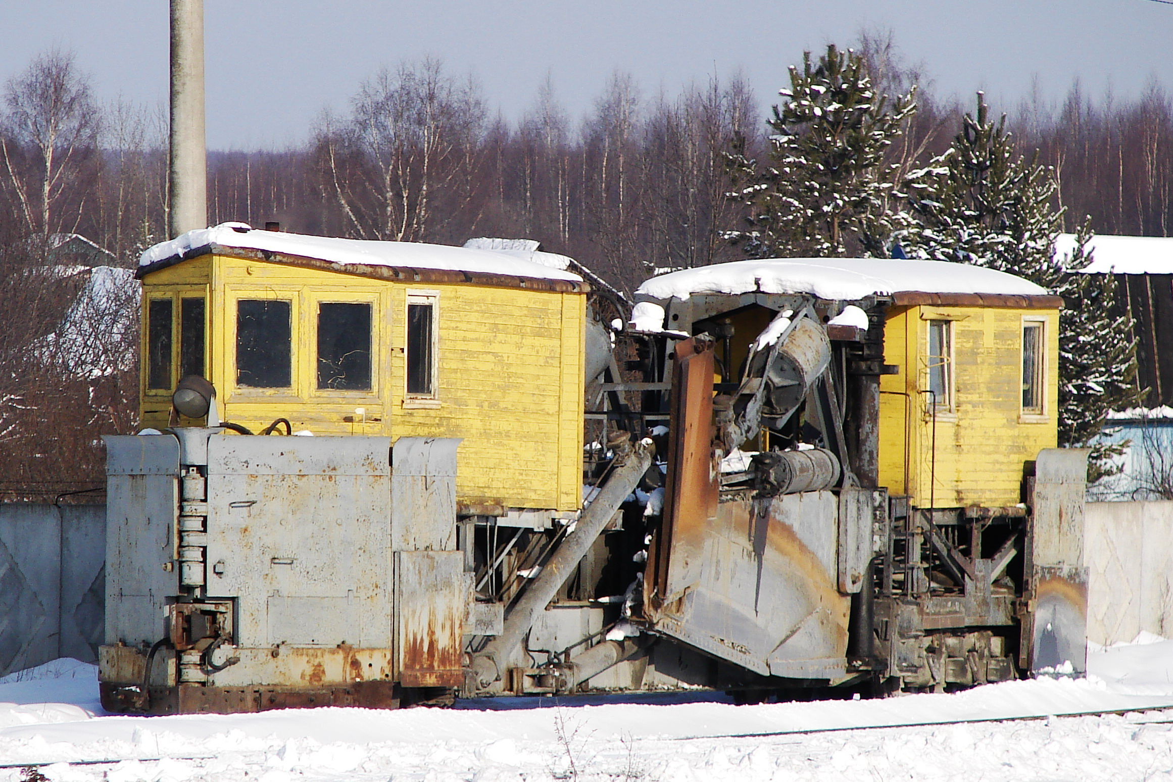 путевой струг-снегоочиститель